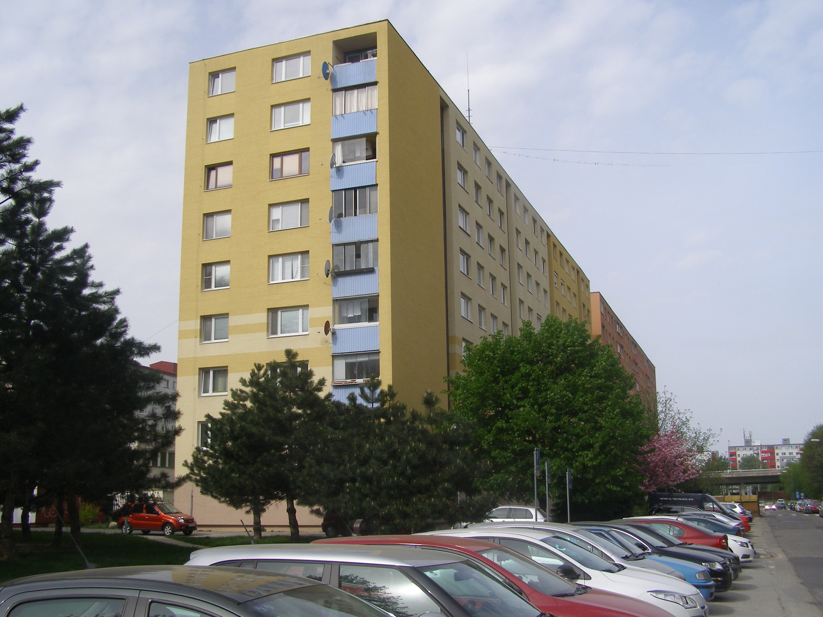 Pifflova street, Petržalka, Bratislava